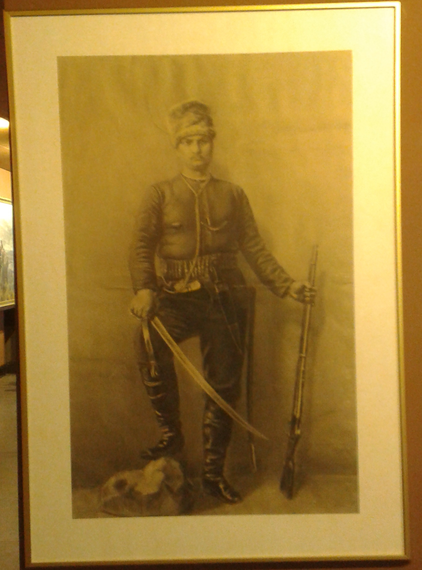 Портрет на Георги Кондолов от Антон Митов. Национален военноисторически музей.